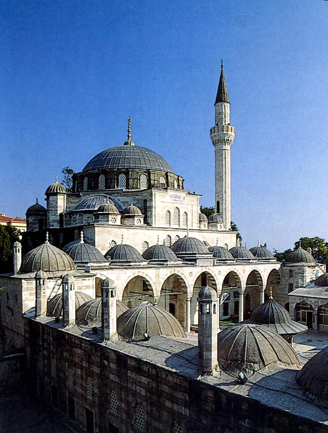 Sokollu Mehmet Pasha Camii exterior view